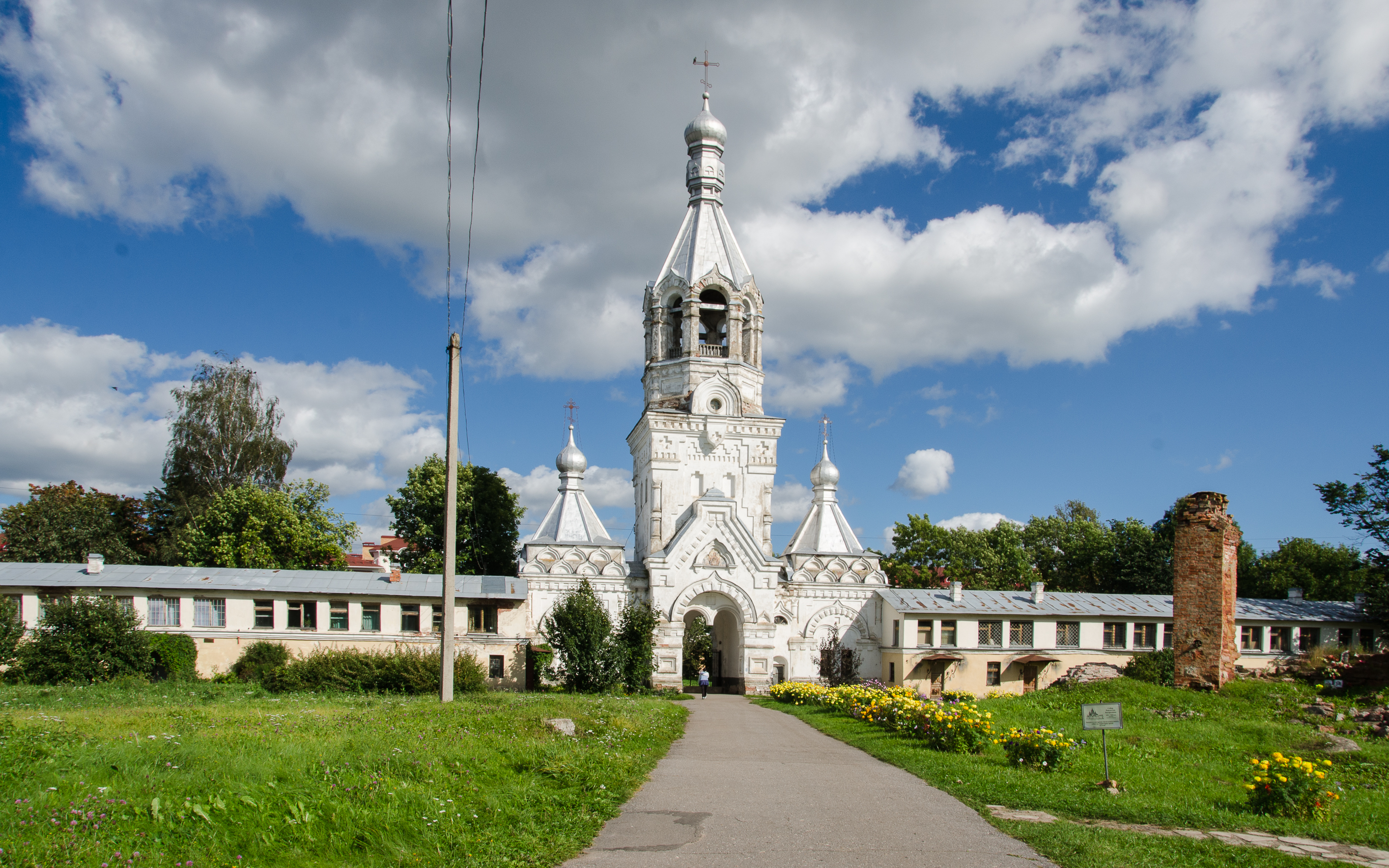 Колокольня надвратная: улица Десятинная, 18, Великий Новгород, Новгородская область